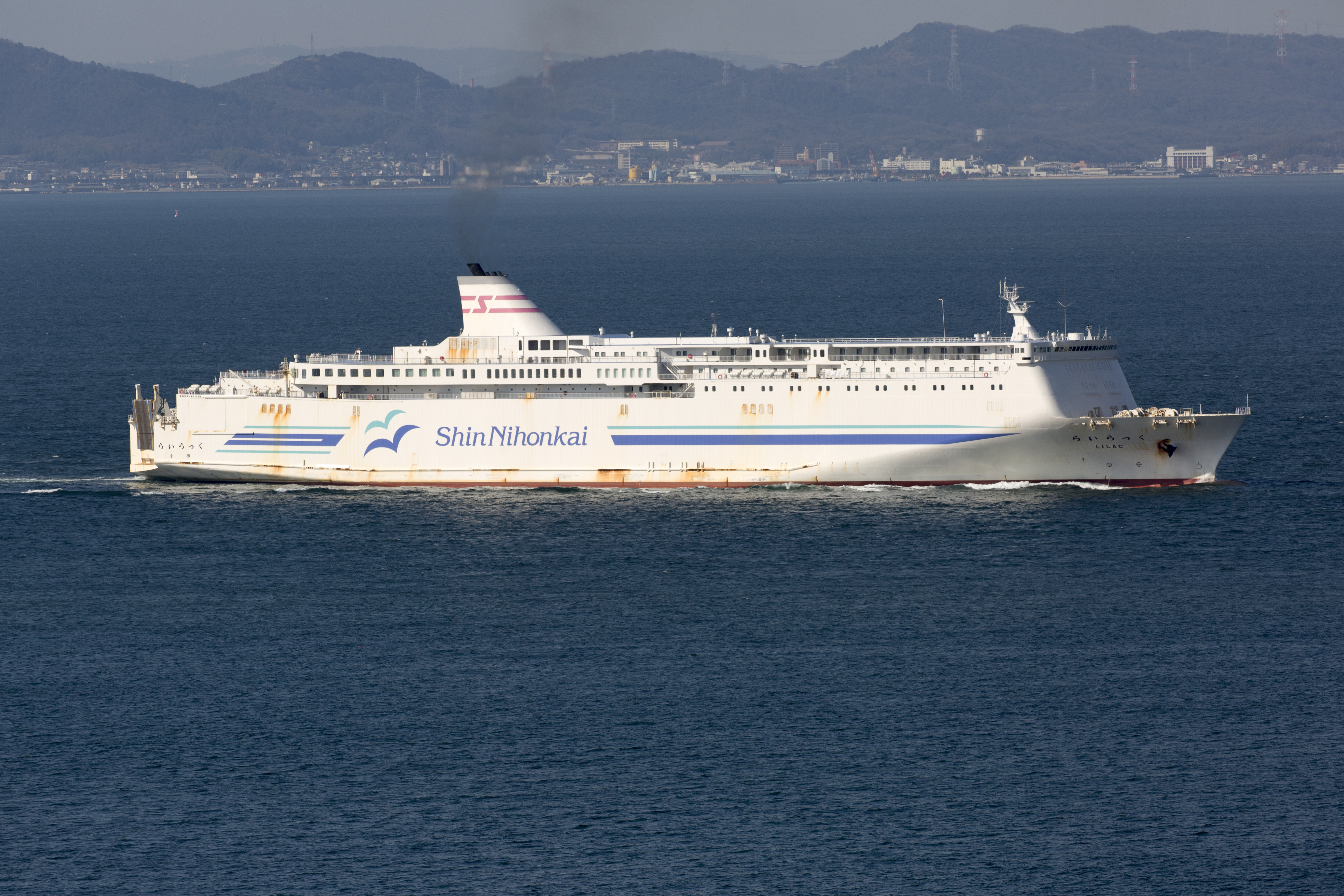 新日本海フェリー らいらっく